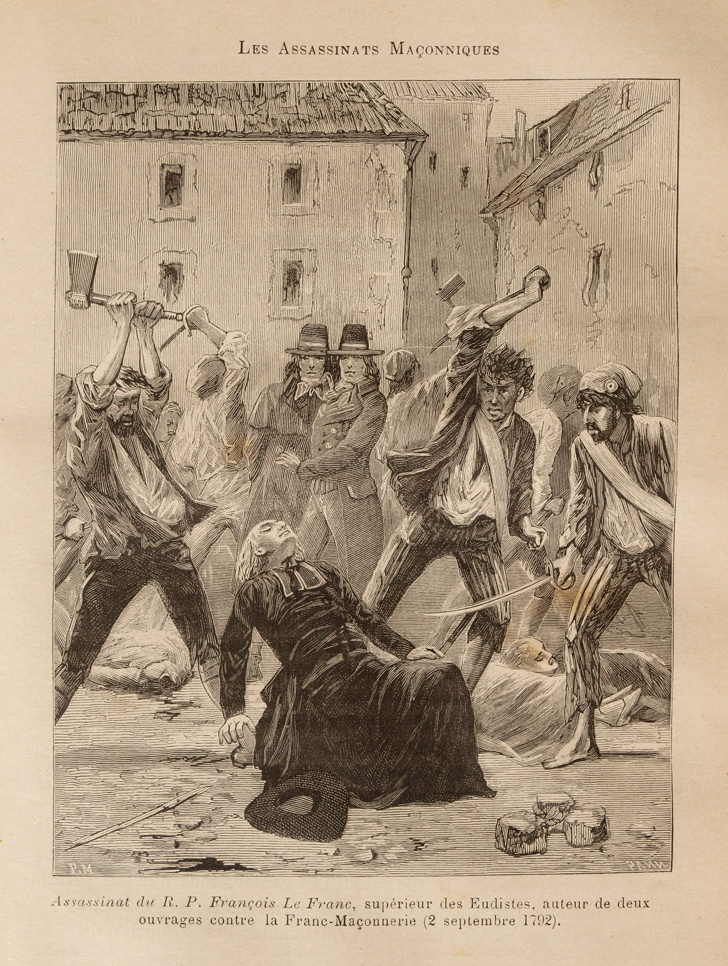 Une des gravures du document de Léo Taxil, Les Mystères de la Franc-Maçonnerie, Paris, 1886.